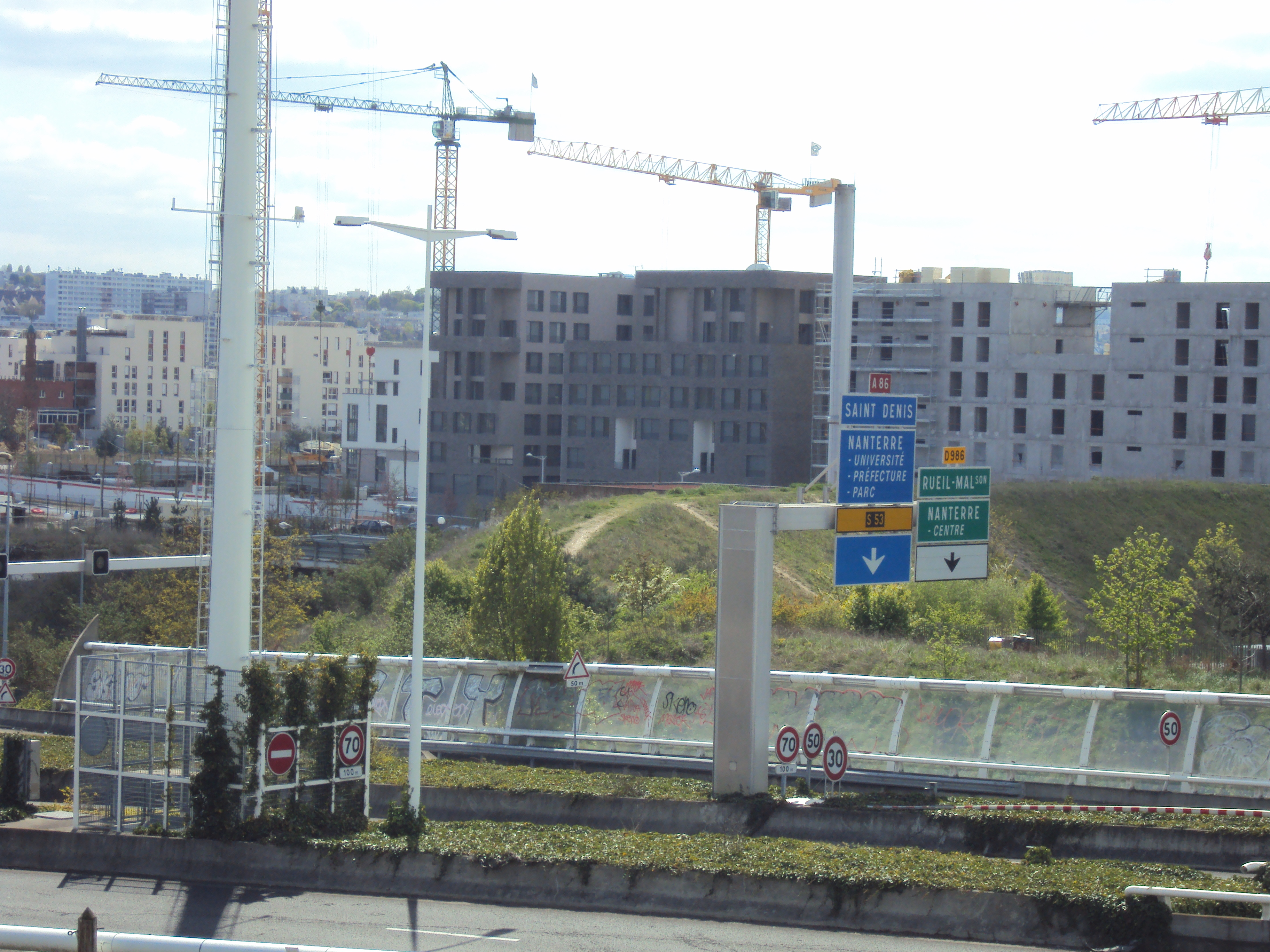 L'autoroute A14 entre la tunnel de la Défense et le viaduc de Carrières-sur-Seine